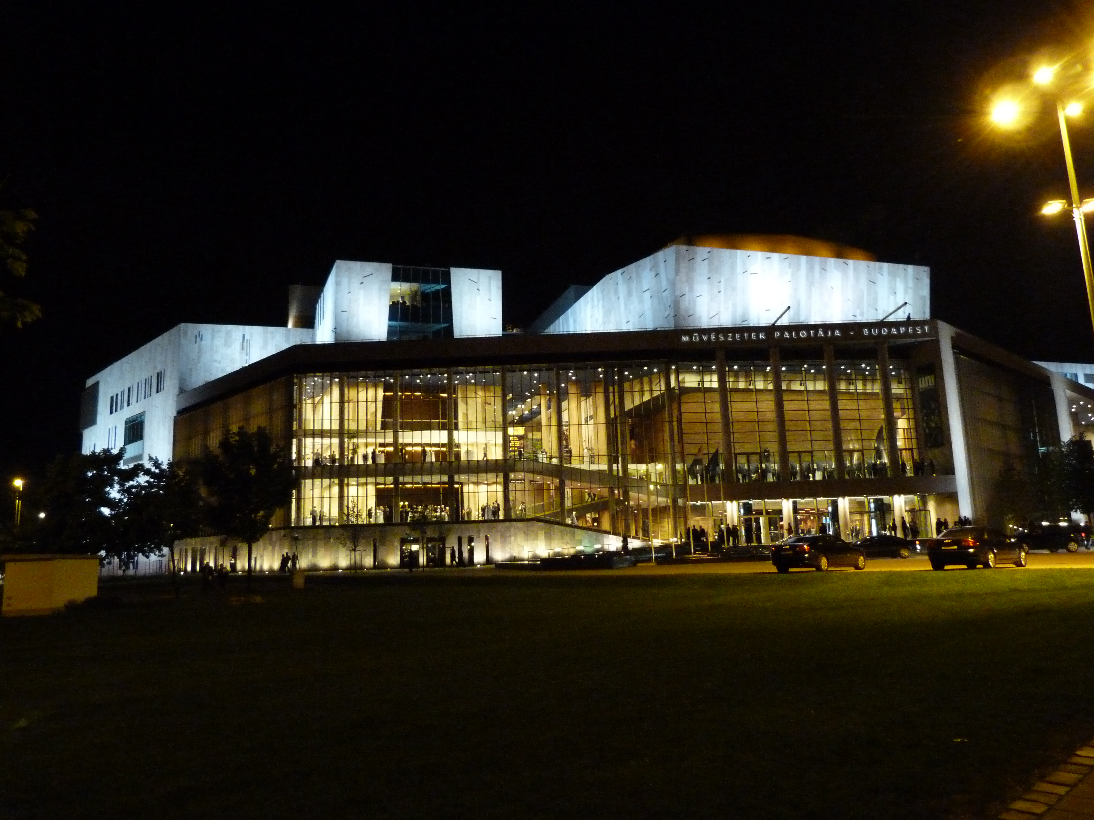 A Művészetek Palotája. A felvétel 2011. április 25-én készült, Budapesten, a Művészetek Palotájáról. Schmitt Pál köztársasági elnök a déli harangszó után írta alá a Sándor Palotában az Országgyűlés által egy héttel korábban elfogadott új alaptörvényt. Este Schmitt Pál a Művészetek Palotájában rendezett Nemzeti Gálán köszöntötte az új alaptörvényt ünneplőket.